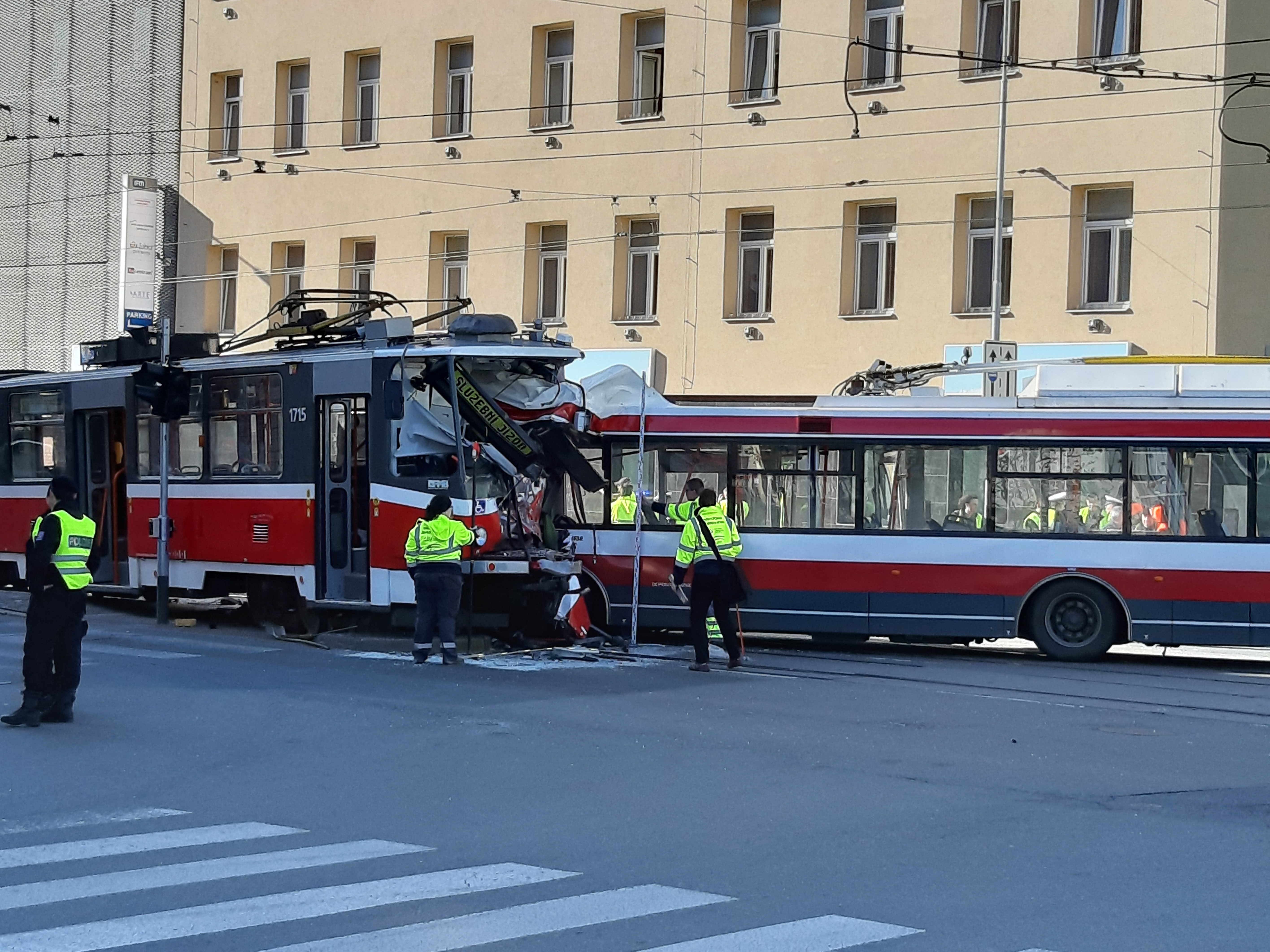 Srážka tramvaje a trolejbusu v Brně.